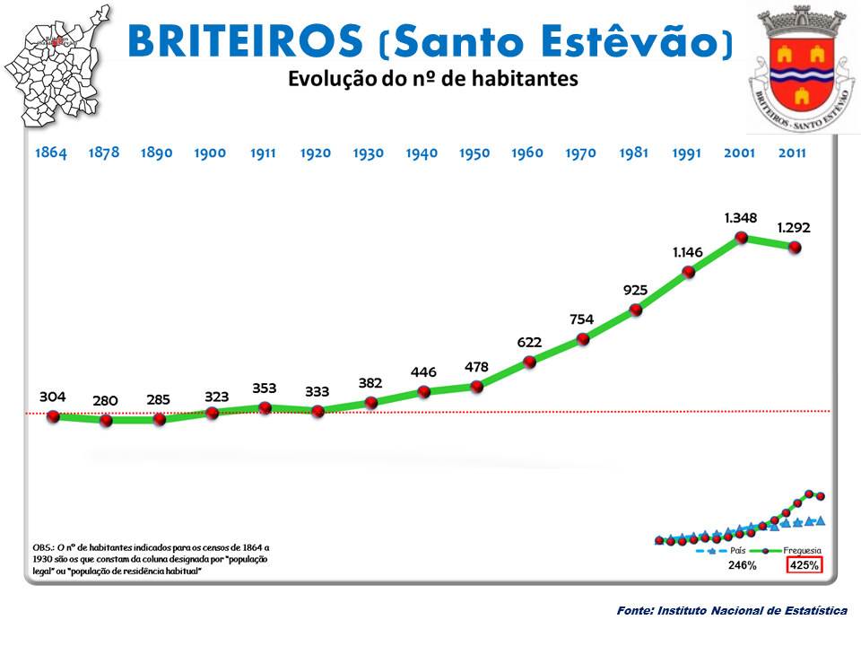 Evolução da População 1864 / 2011